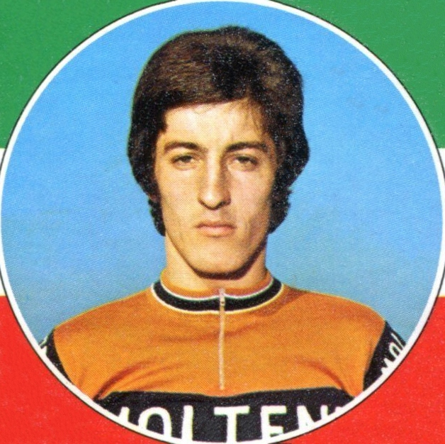 SPRINT '73 - PANINI - Figurina-Sticker n. 251 - ALDO PARECCHINI - ITA -Rec